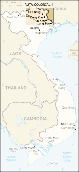 Fortines de la Ruta Colonial 4 también llamada La Carretera de la Muerte